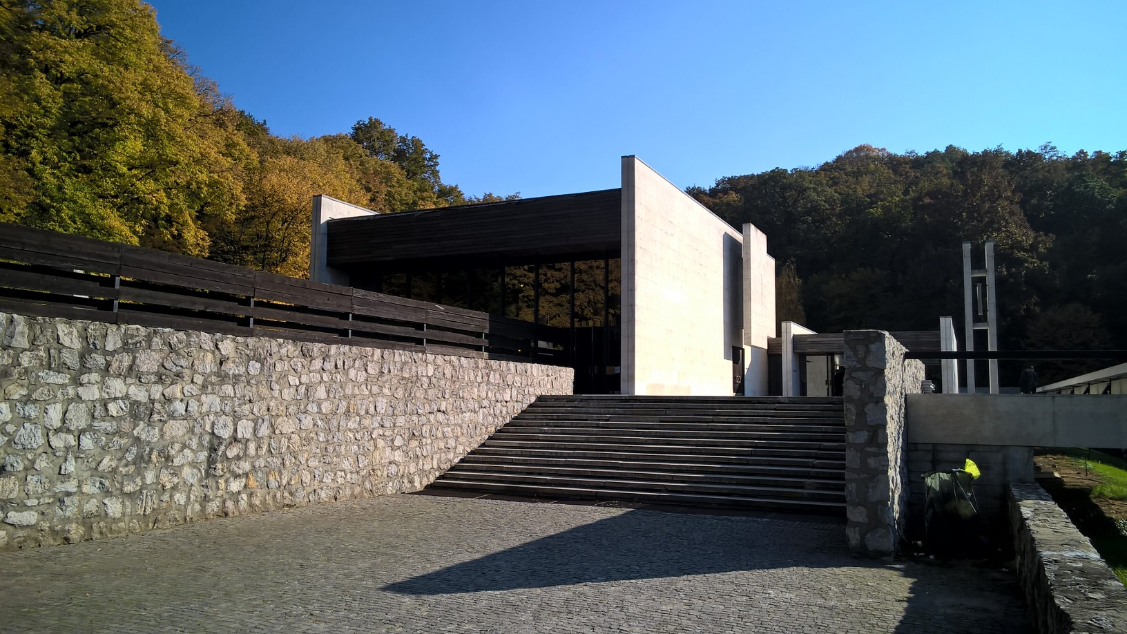 Pohled z blízka